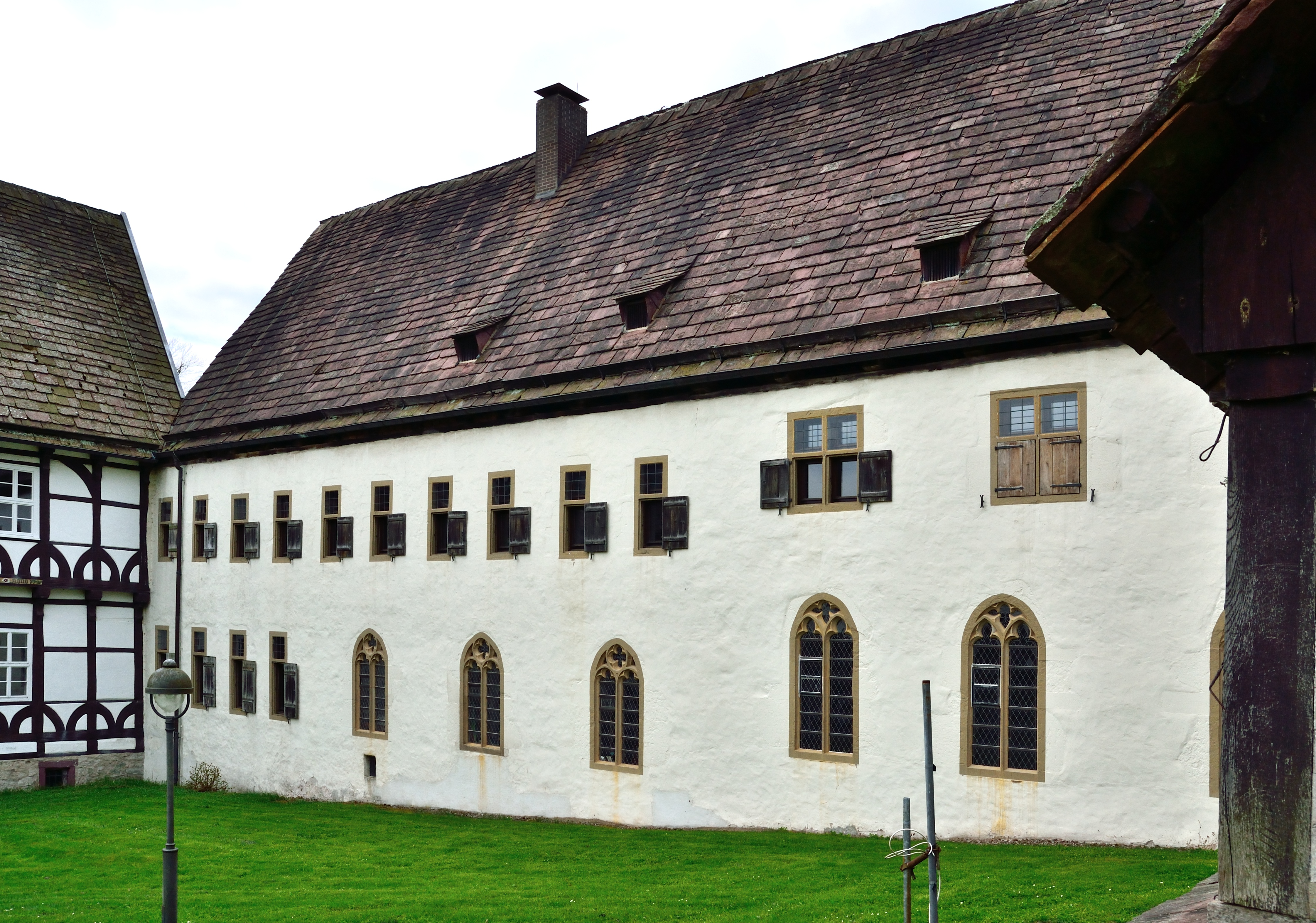 Kapitelsaal der evangelisch-reformierten Klosterkirche Falkenhagen, Ostseite